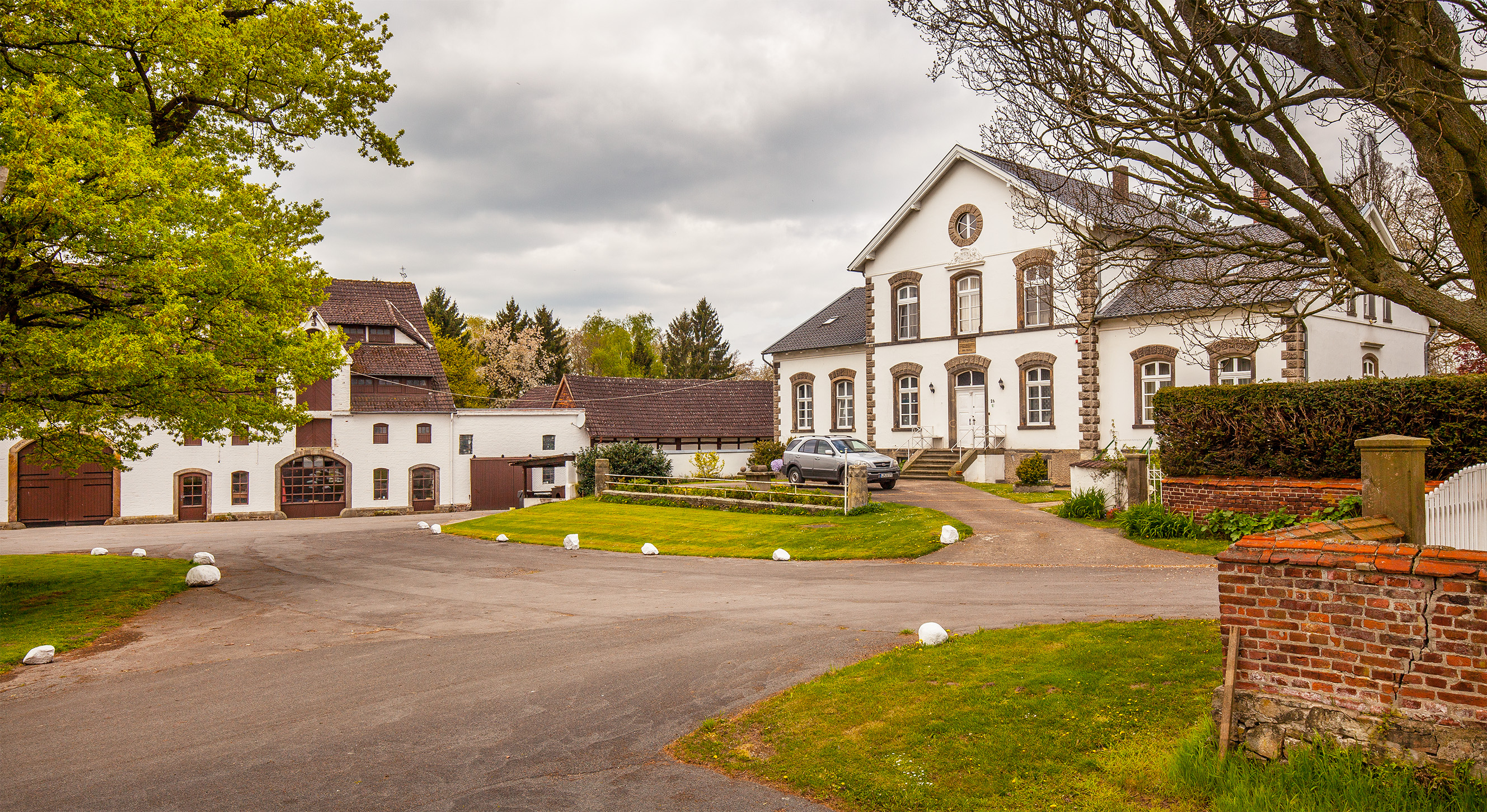 Gut Hündersen in Bad Salzuflen (Grastrup-Hölsen), Kreis Lippe, Nordrhein-Westfalen. This is a photograph of an architectural monument.